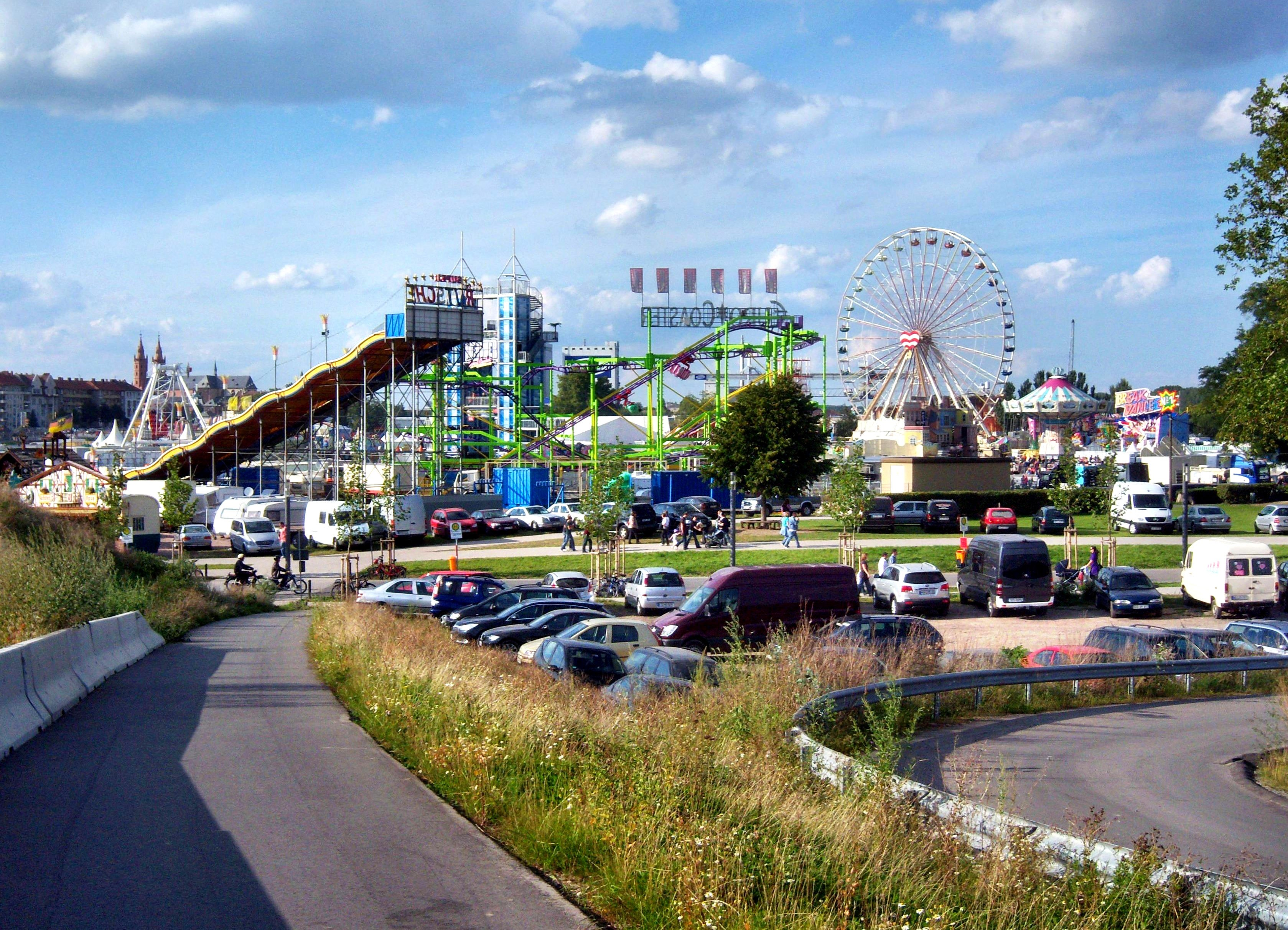 Das Backfischfest im Jahr 2010 auf dem Wormser Festplatz „Kisselswiese“ in Rheinland-Pfalz (Deutschland)